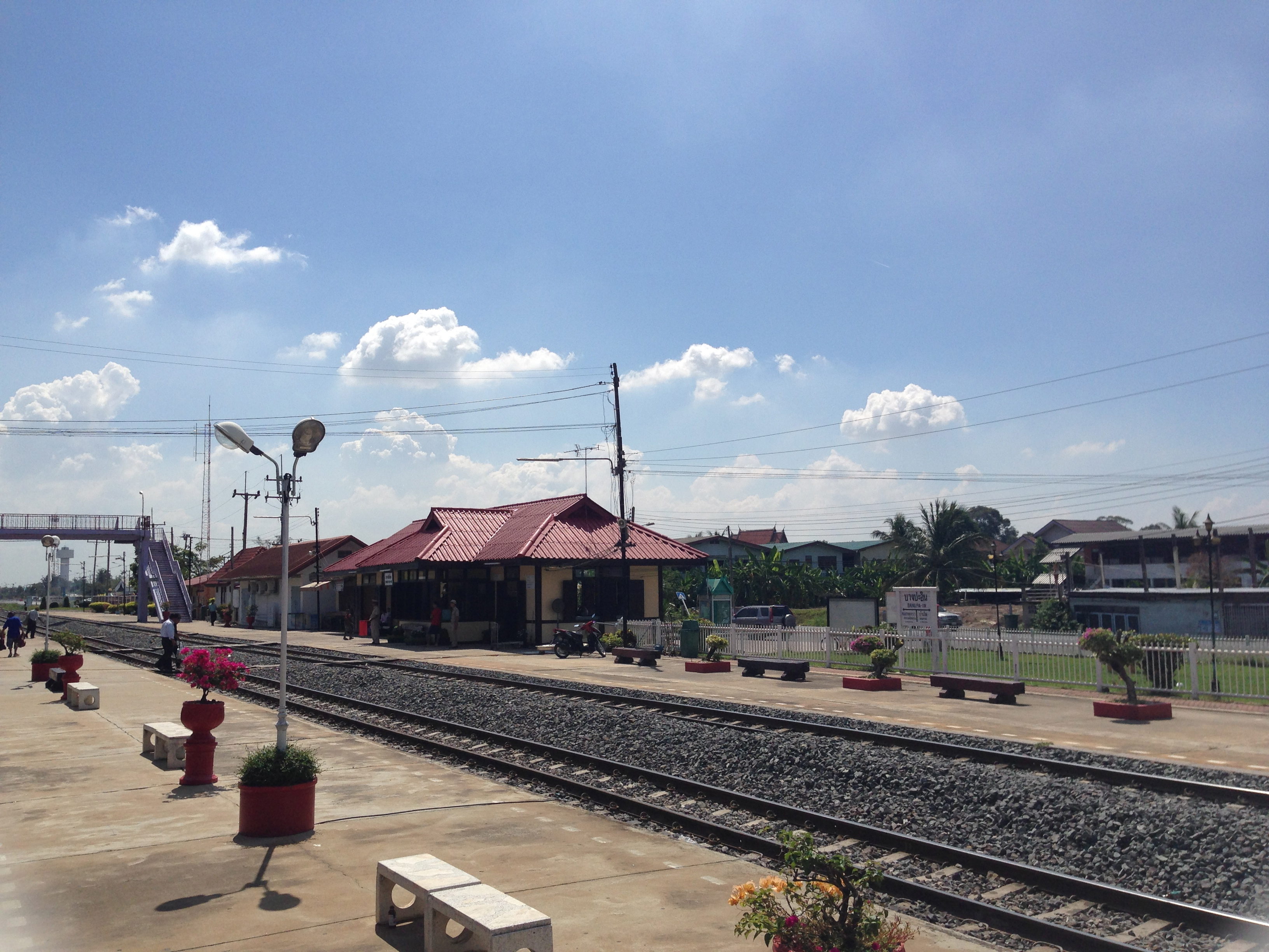 Bang Pa-In Railway Station, Ban Len, Ayutthaya, Thái Lan